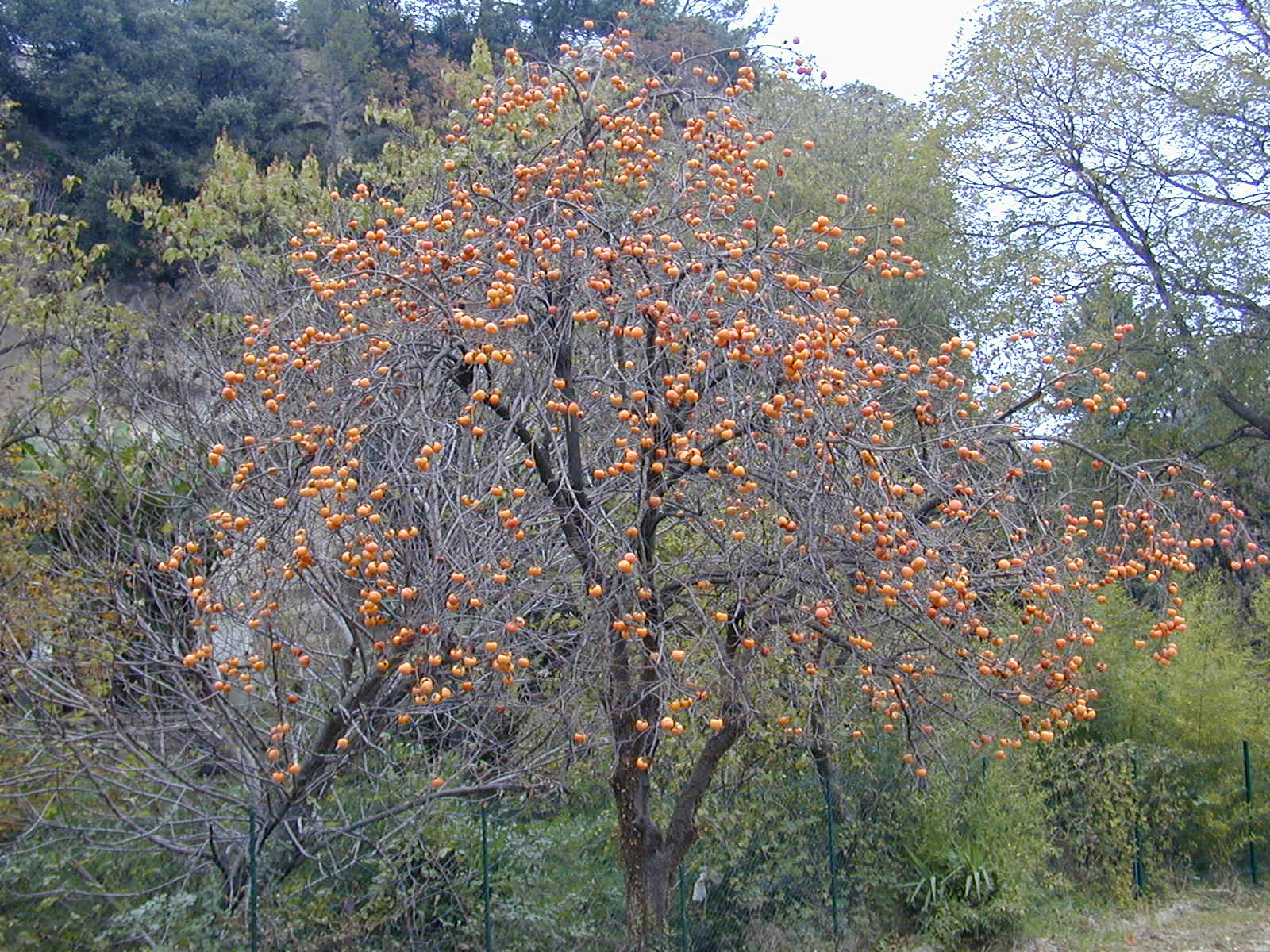 Plaqueminier (Diospyros kaki) et ses kakis dans un jardin de Saint-Bonnet-du-Gard (Gard, Languedoc-Roussillon, France).